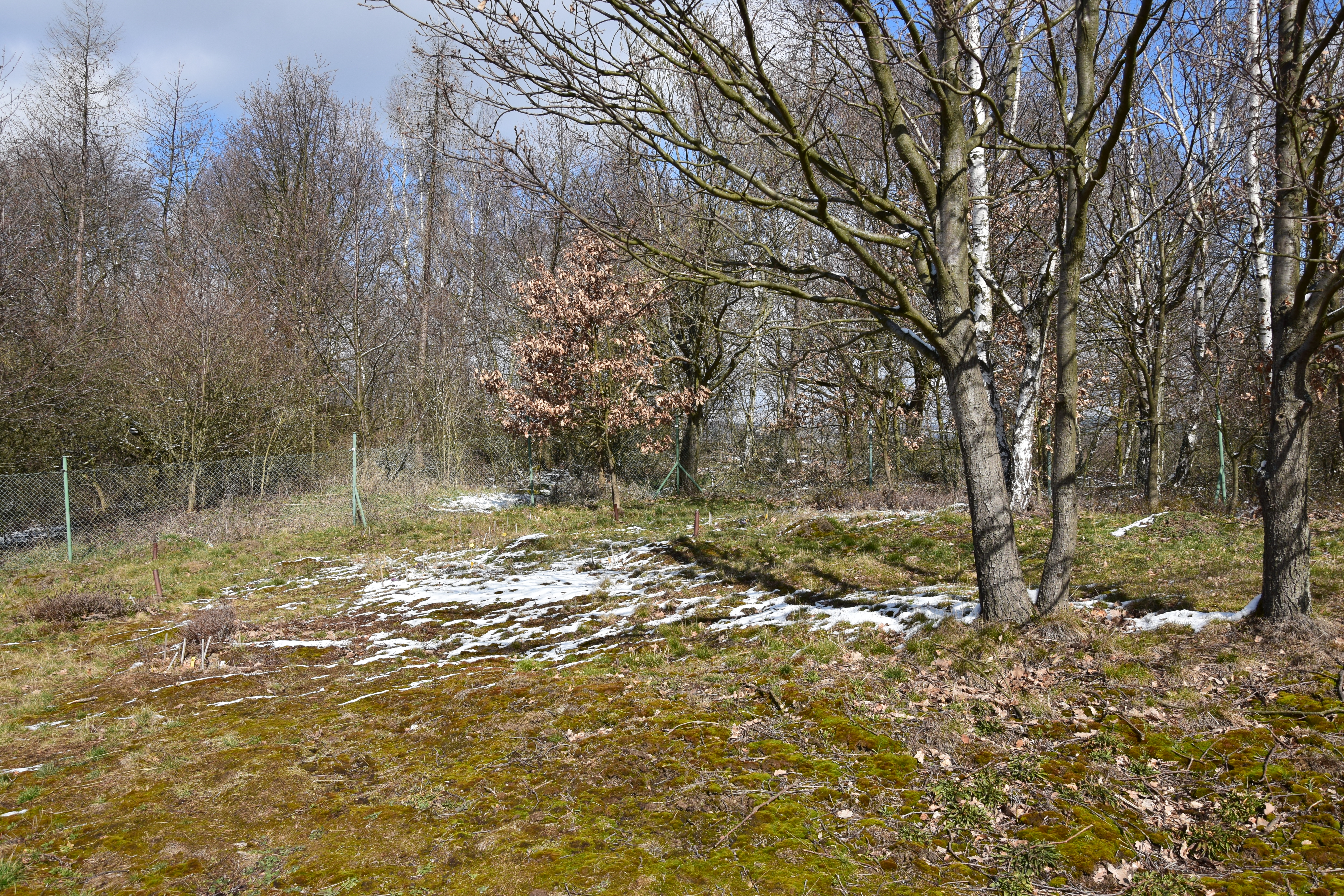 Přírodní památka Krásná Lípa – Lorberova loučka